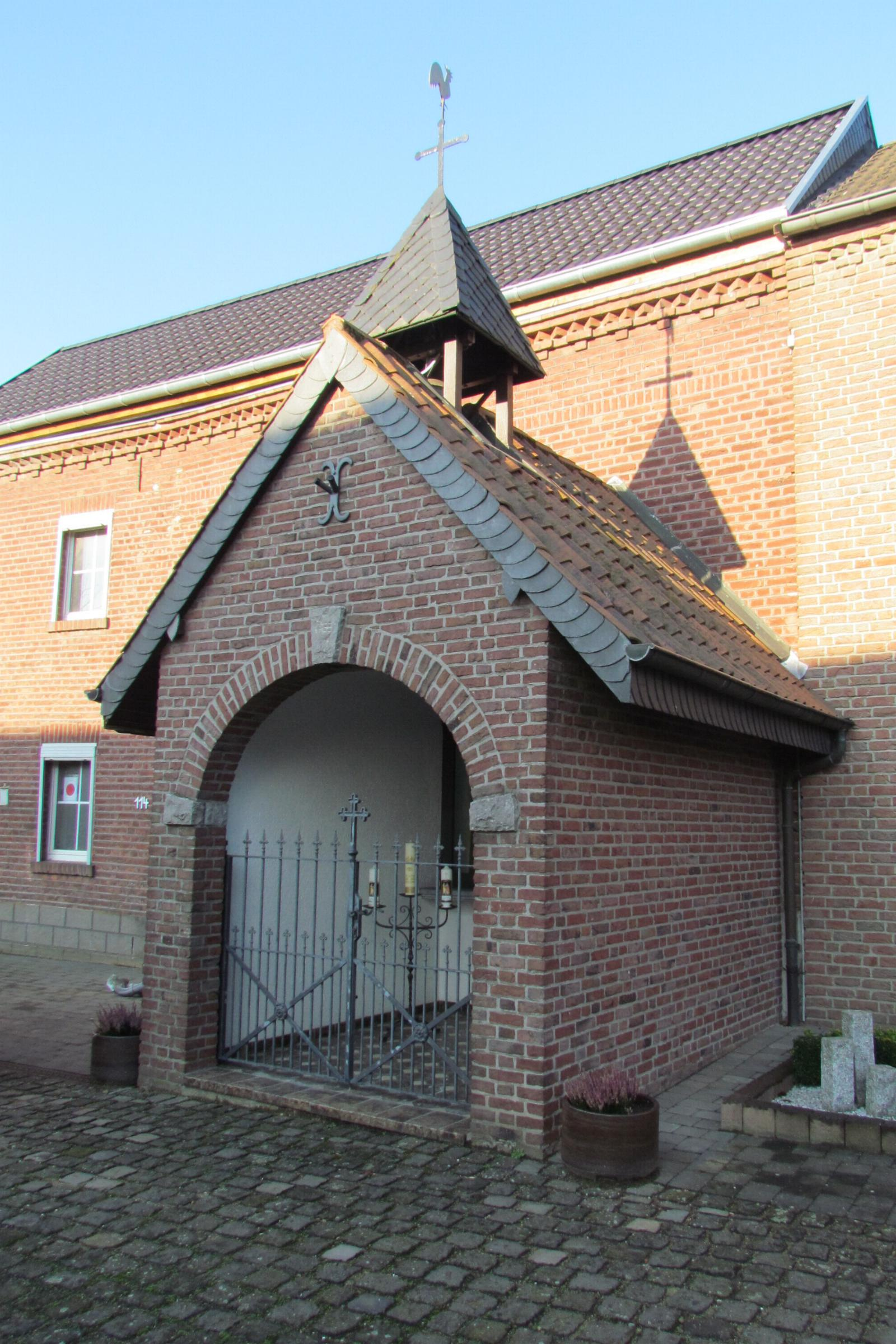 Heiligkreuz-Kapelle in Hatterath